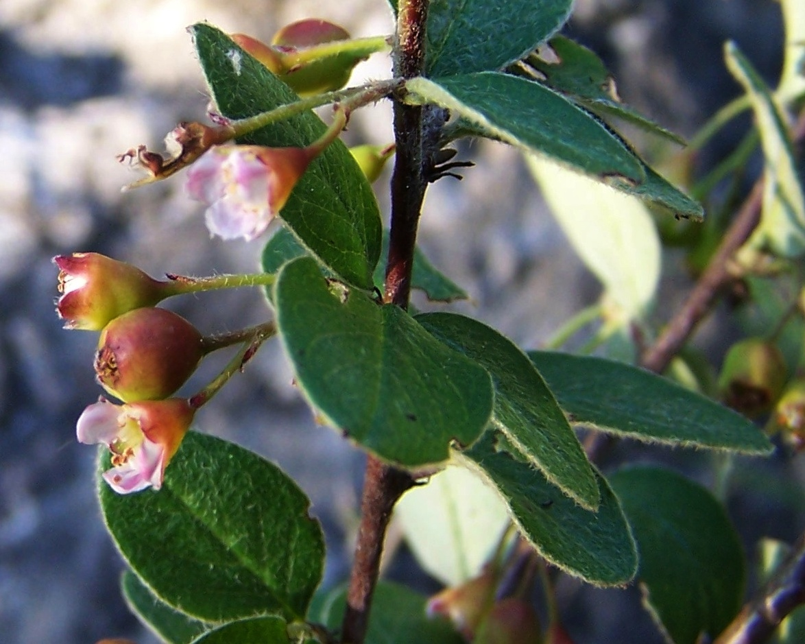 Cotoneaster niger (habitat:Pieniny, Kacze)